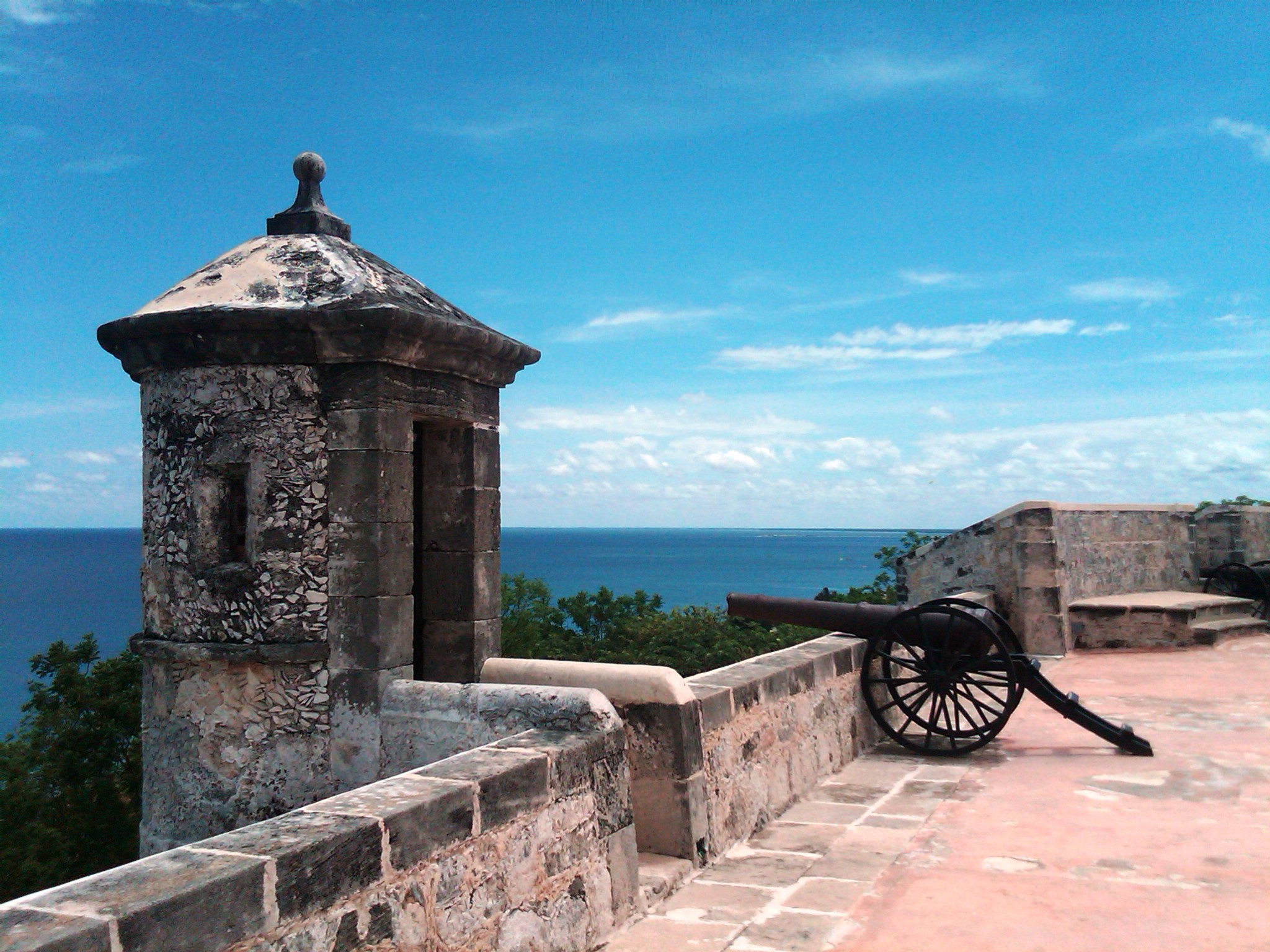 Vistas del Fuerte de San Miguel. San Francisco de Campeche, Campeche.